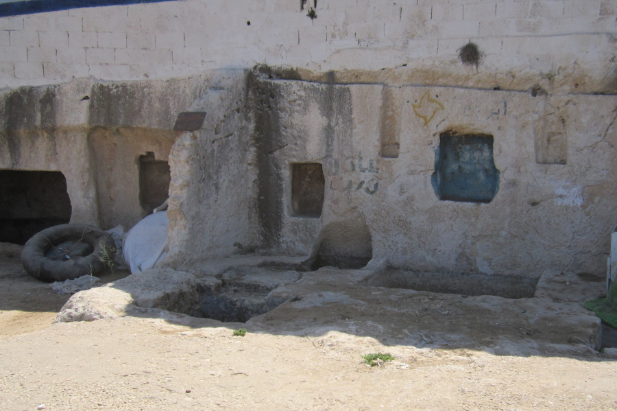 old ruins